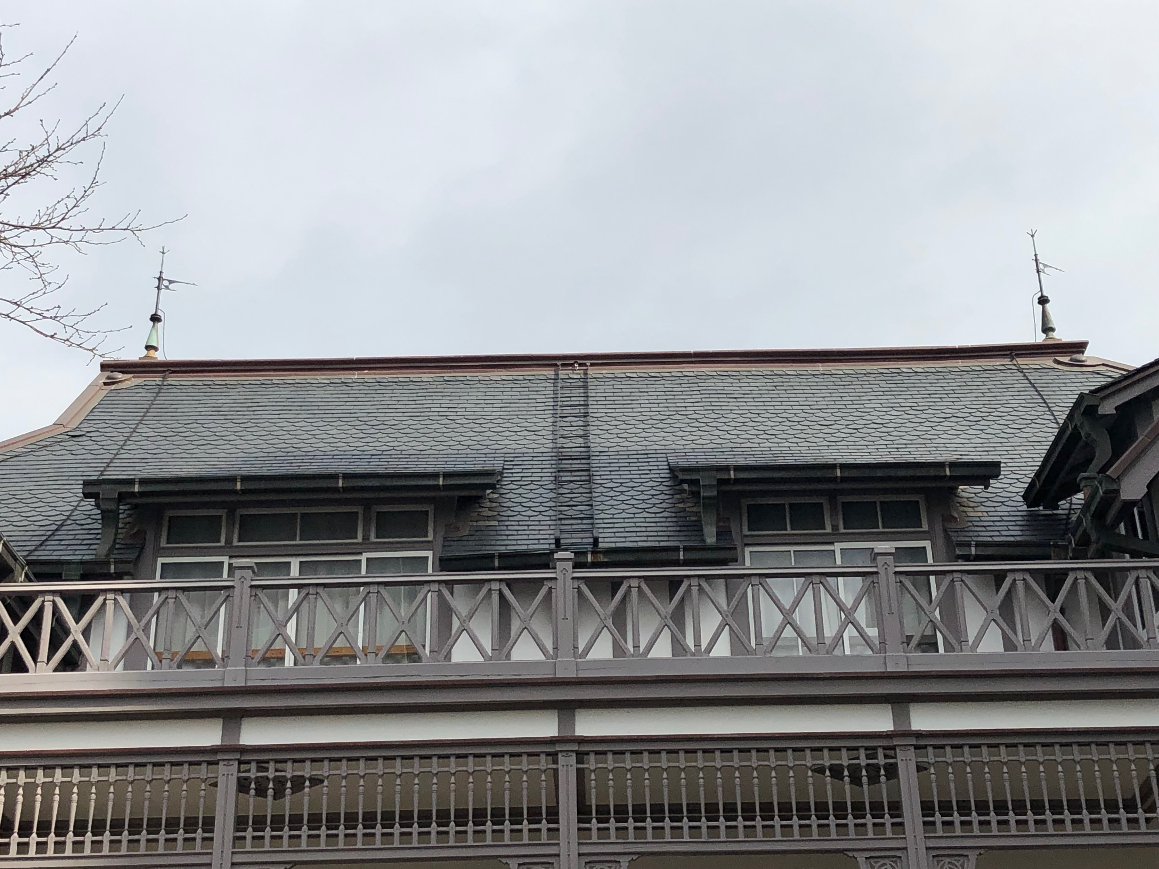 ２０１９年２月１６日撮影